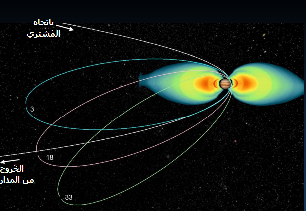 مسار مركبة جونو الفضائيَّة عبر أحزمة المُشتري الإشعاعيَّة.